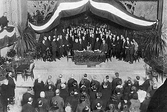 Erklärung der Unabhängigkeit der Republik Lettland. Lettisches Nationaltheater, 18. November 1918